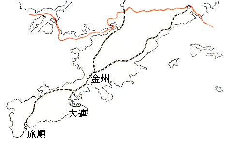 関東州（日本の租借地) 1905-1945